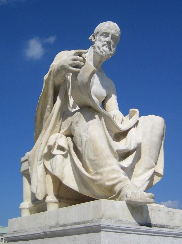 Polybios-Statue auf der linke Rampe des Parlaments: griechische Seite